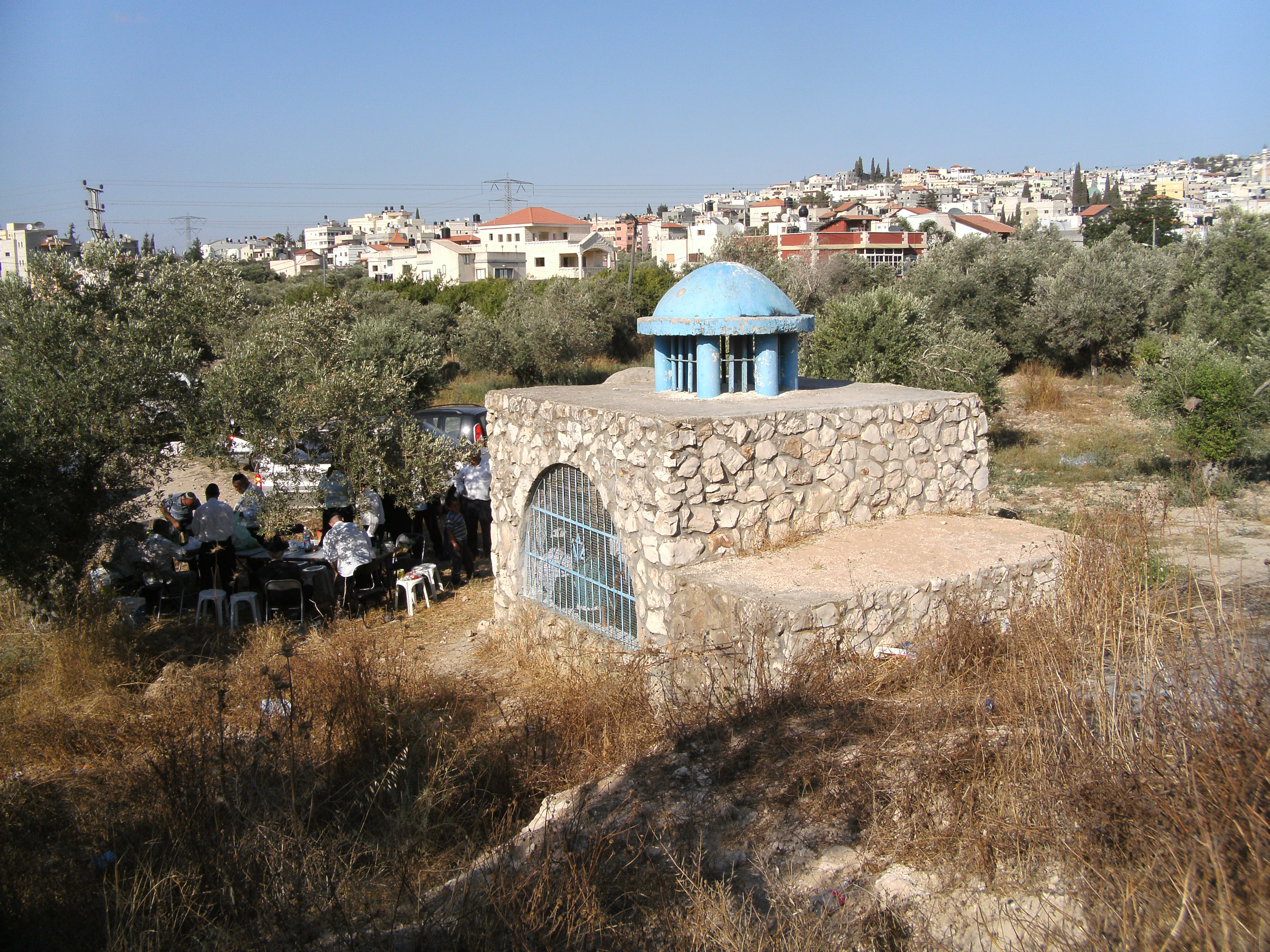 קבר רבי שמעון בן גמליאל בכפר כנא